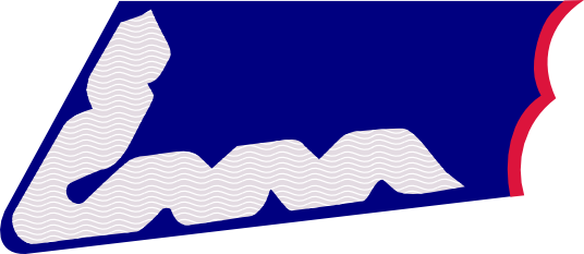 Łapka generała na kołnierz kurtki - II RP